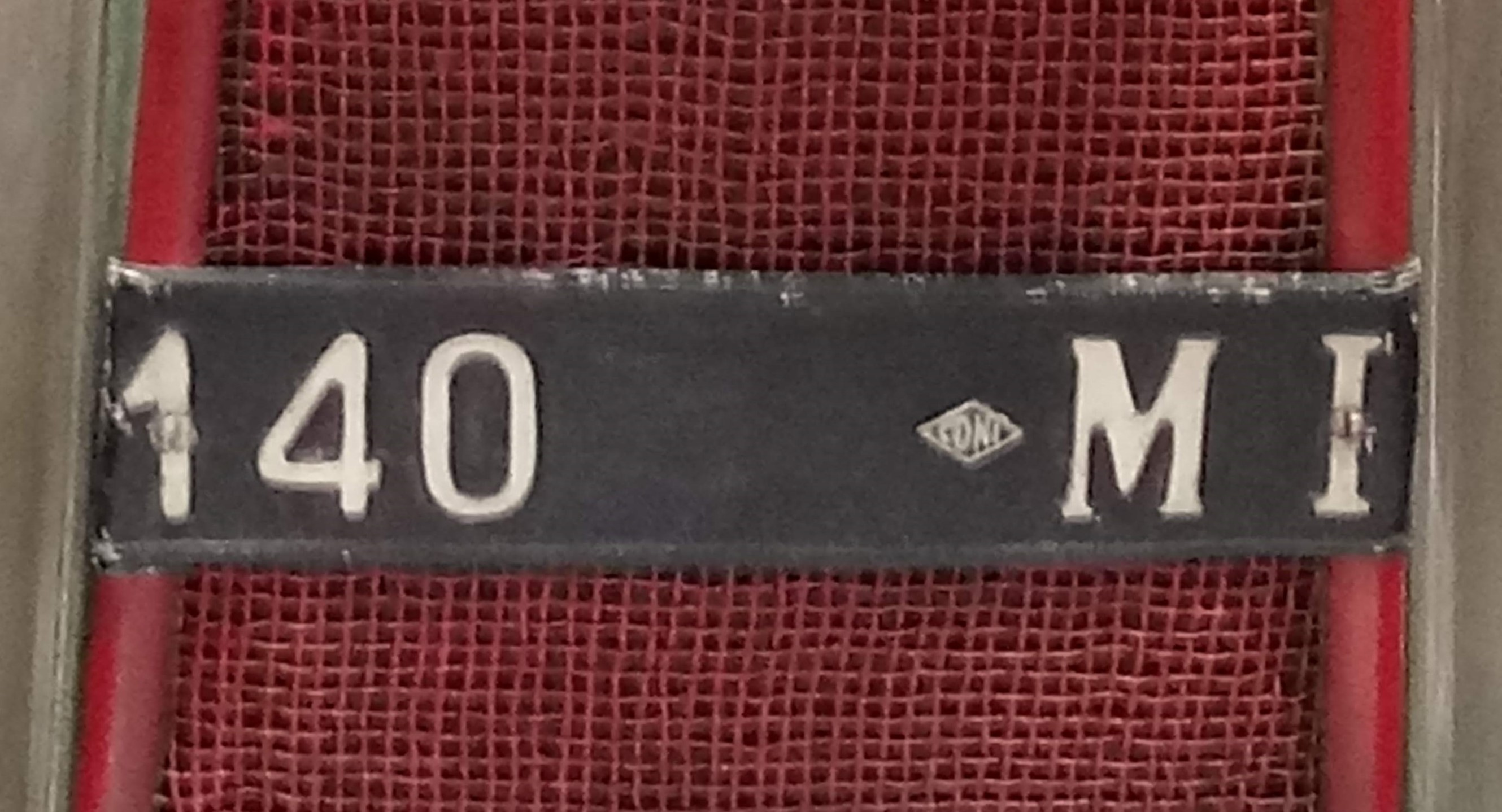 Targa anteriore di una FIAT 501 S del 1921 con impresso stemma del CONI. Foto scattata in uno dei padiglioni di " Auto e moto d'epoca" presso la fiera di Padova, il 26/10/2019